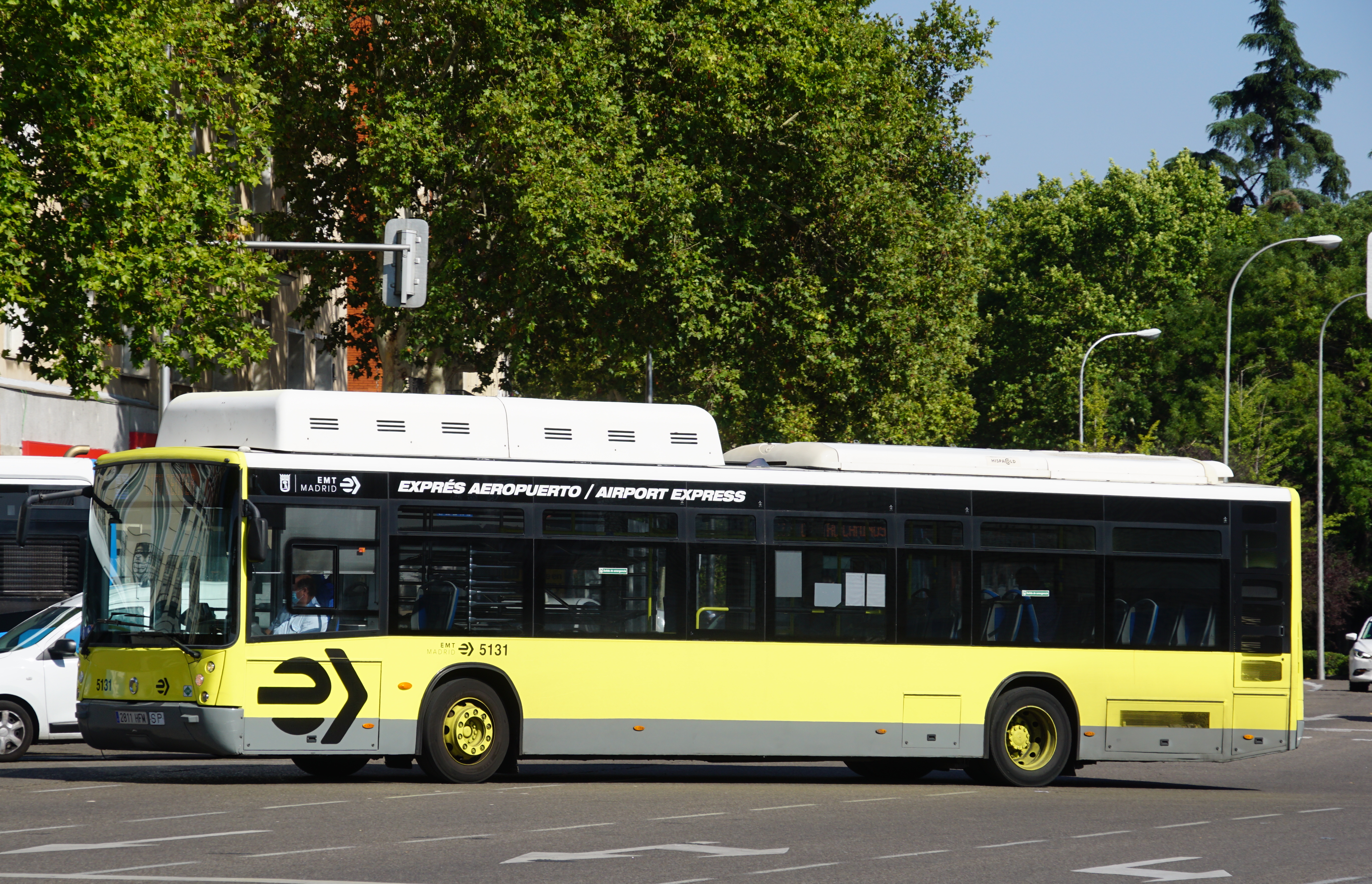 200 EMT Madrid en la estación de Atocha, agosto 2020